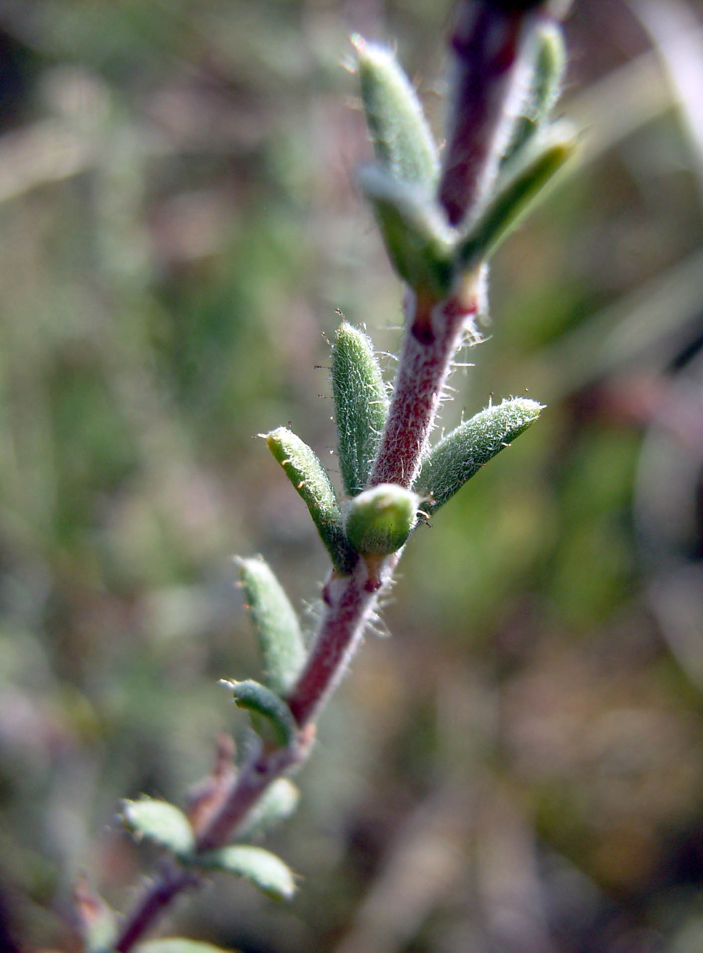 Zweig der Glocken-Heide (Erica tetralix), Nordwestdeutschland